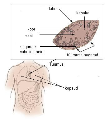 Tüümus